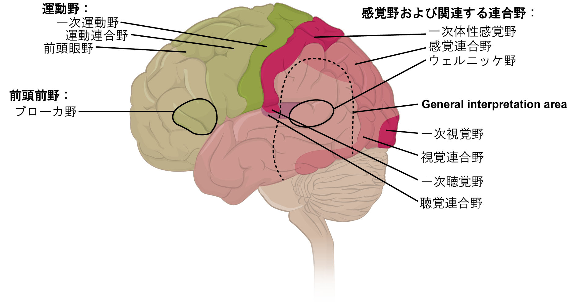 ヒトの脳の各皮質領域